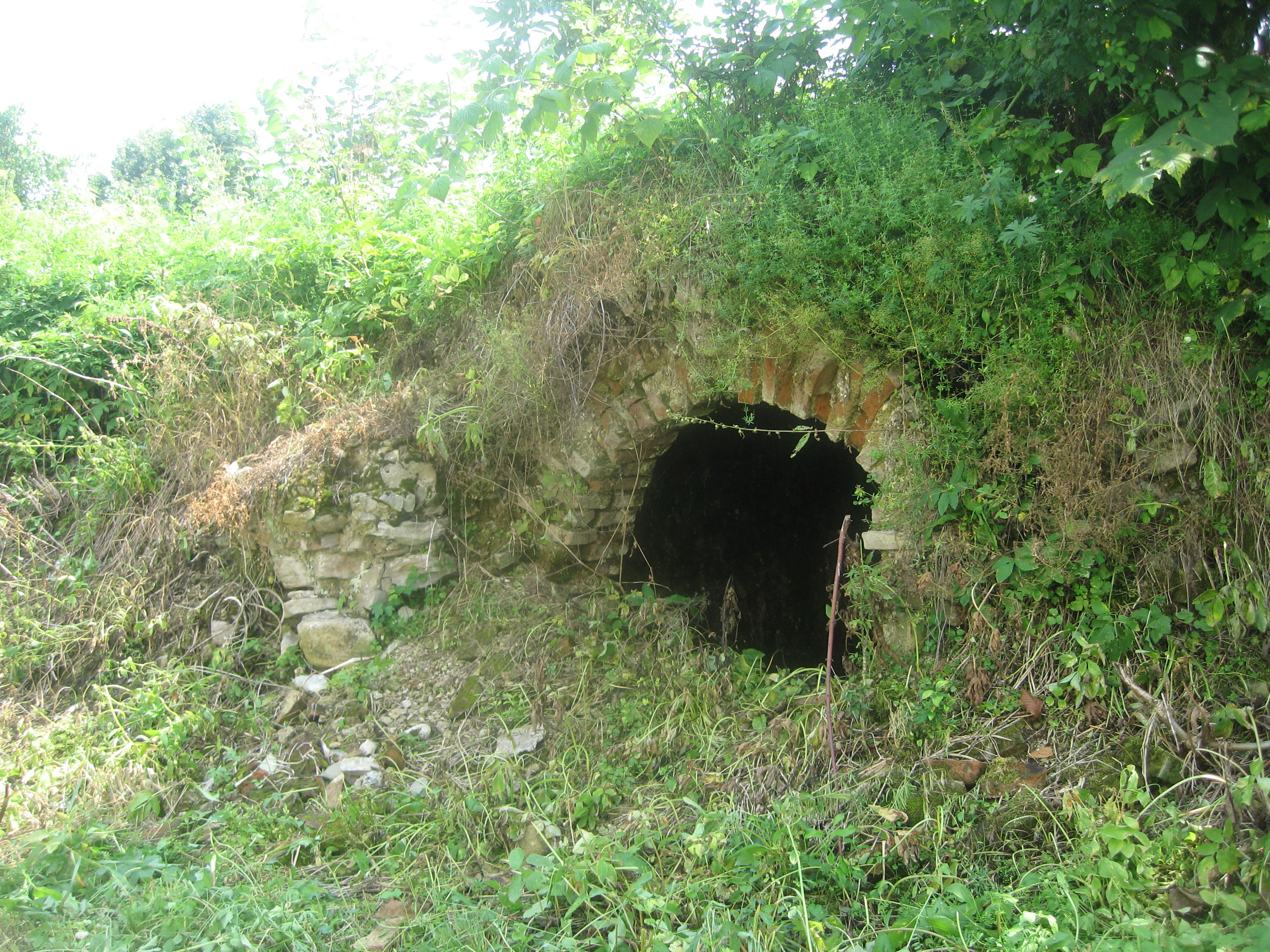 Biserica "Sf. Apostoli Petru și Pavel" din Solca 03